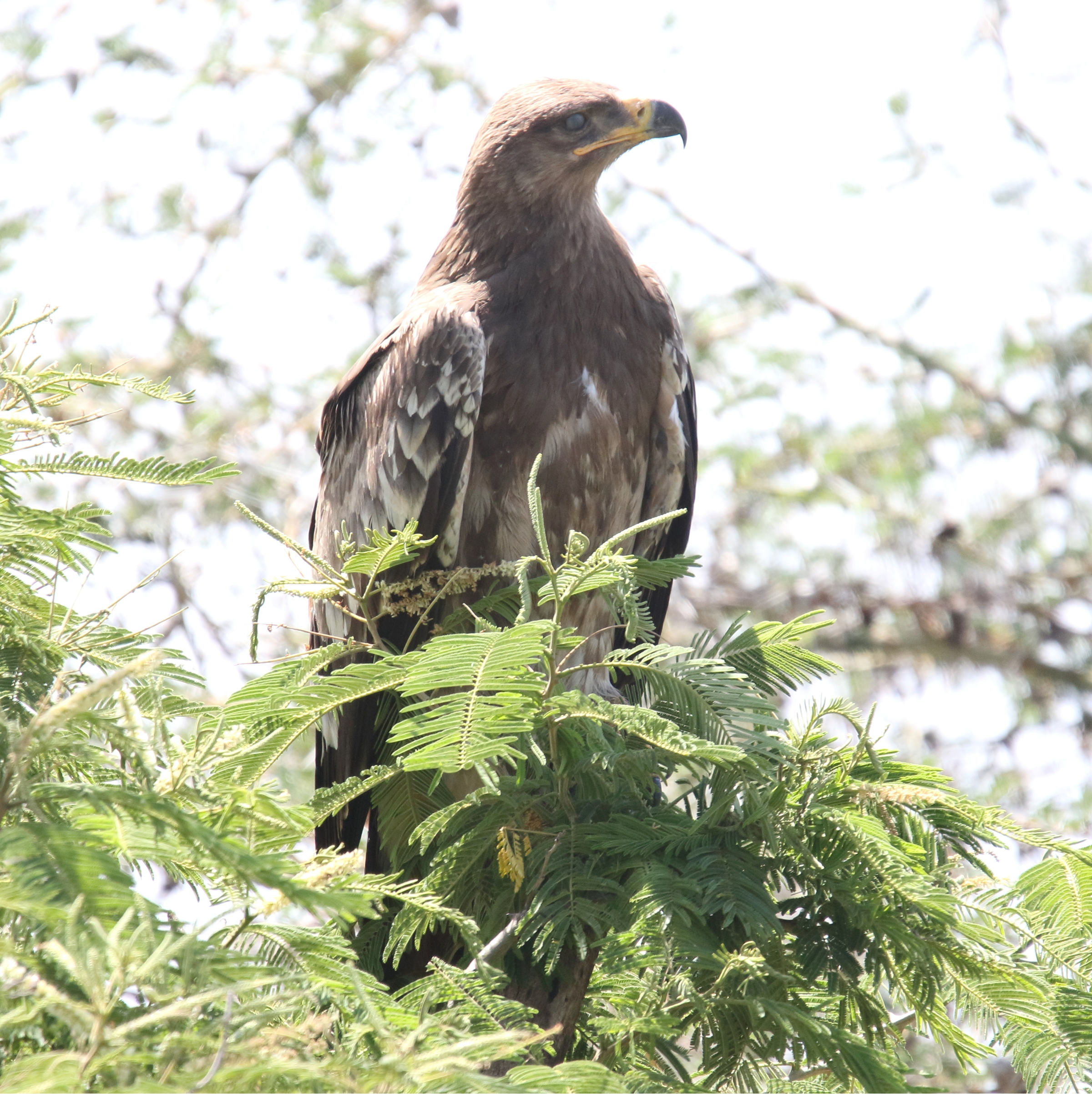 Steppe Eagle (Aquila nipalensis)